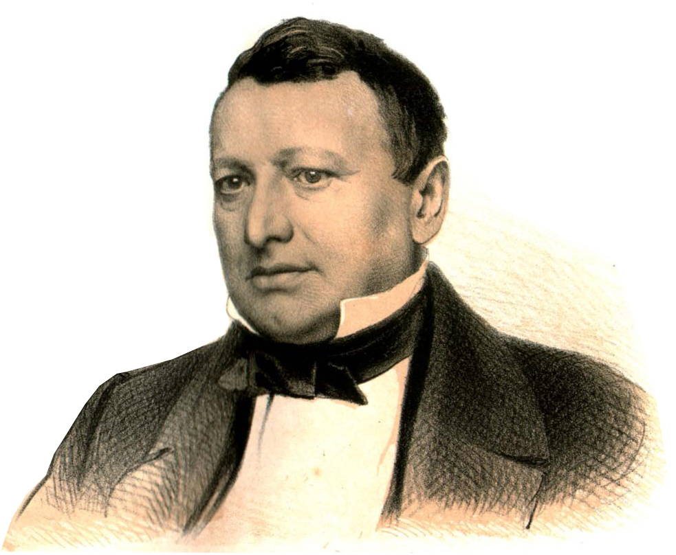 Петров, Осип Афанасьевич